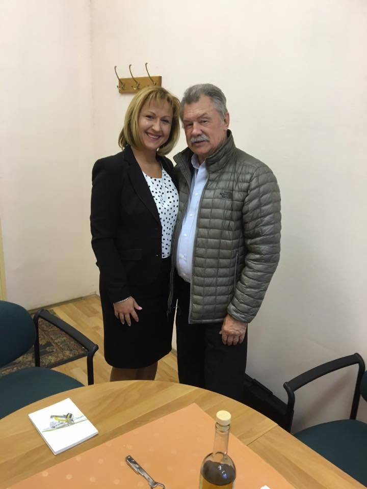 Farkas Bertalan, űrhajós, 2017-ben az Egri Szakképzési Centrum Szakmák Éjszakája rendezvényén vett részt